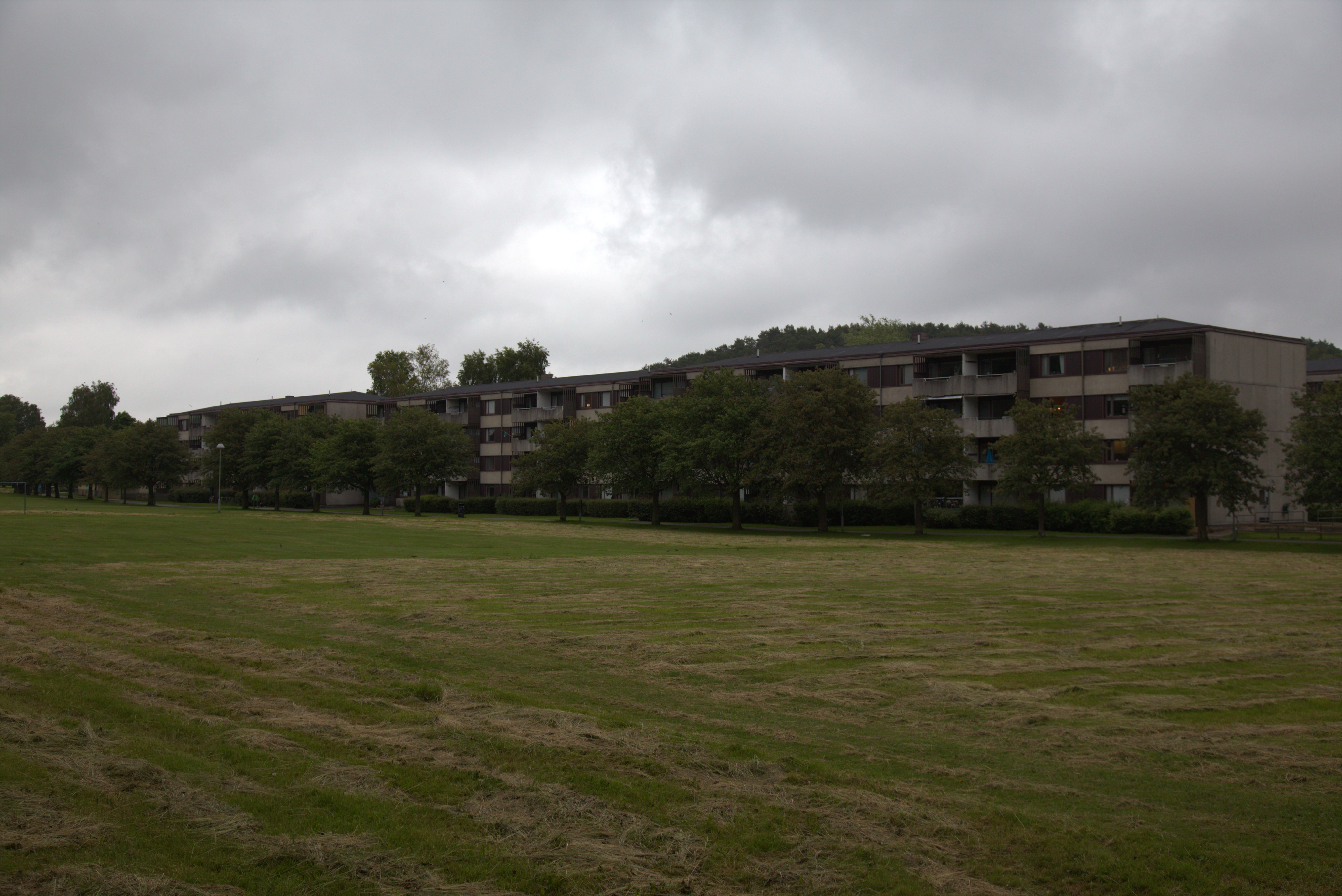 Baksidan (den västra) av hyreshusen på Långströmsgatan i Svartedalen på Hisingen.